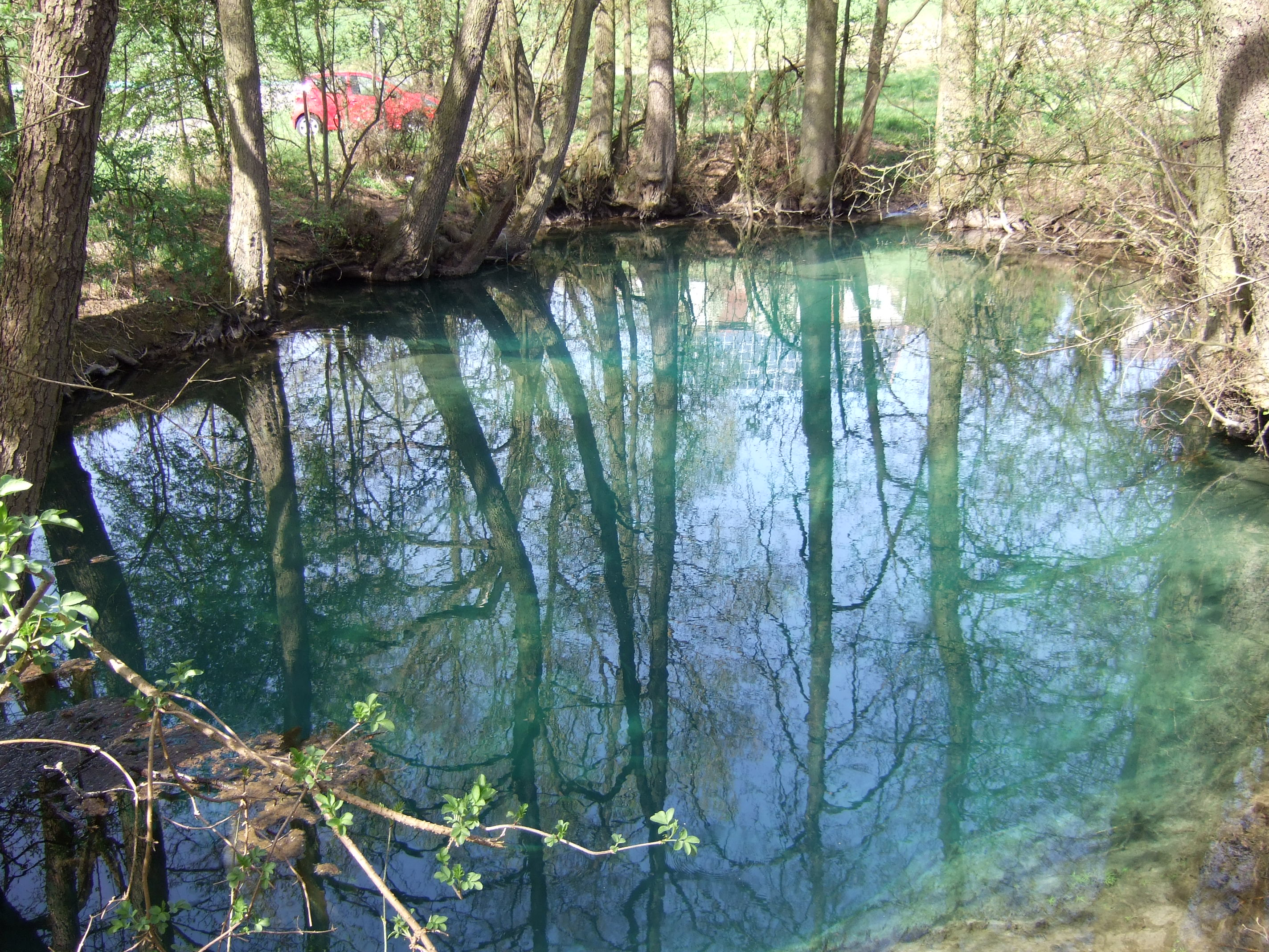 Das Kühle Loch